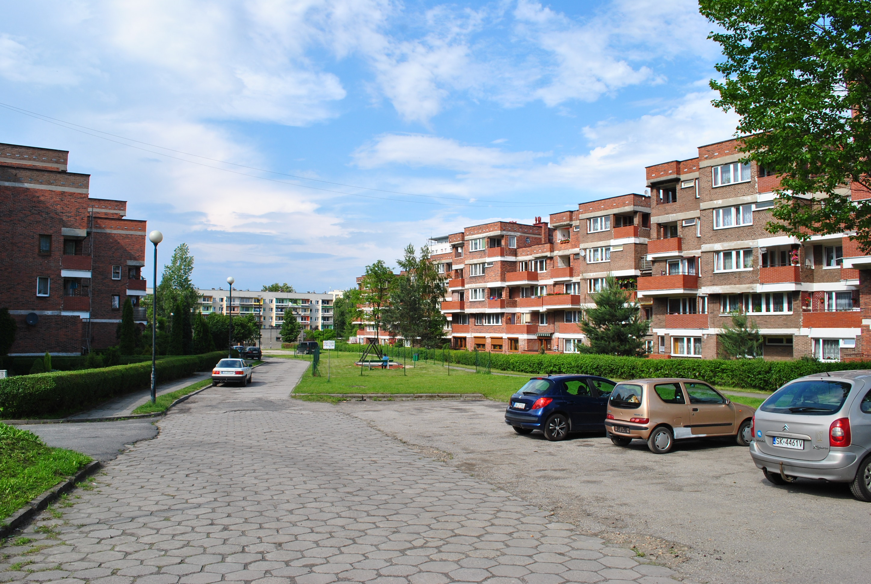 Katowice - Osiedle Witosa. Budynki mieszkalne przy ul. Sławka